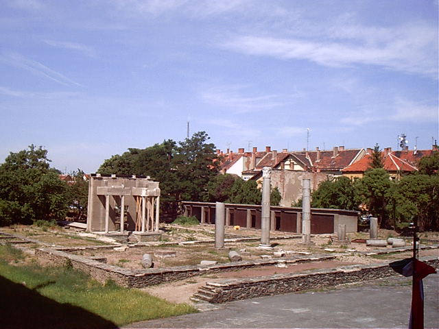 Az Ízisz-templom romjai Szombathelyen